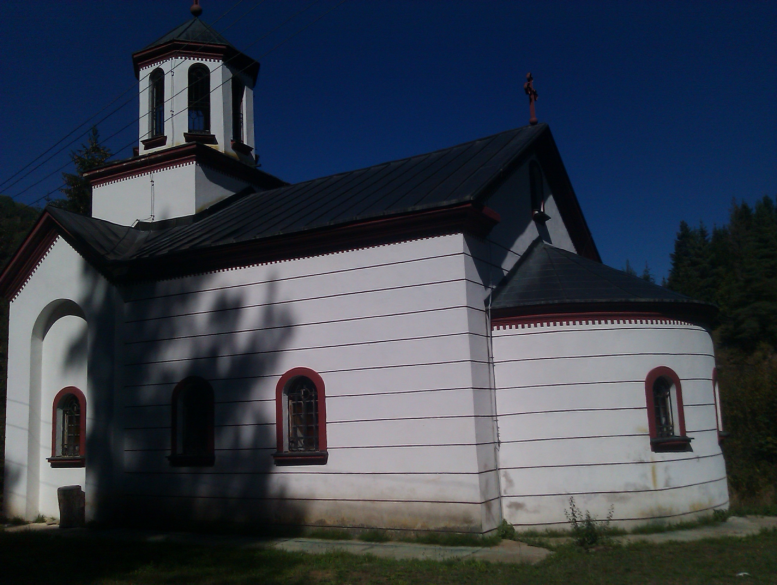 Srpski (latinica): Crkva u Brodu